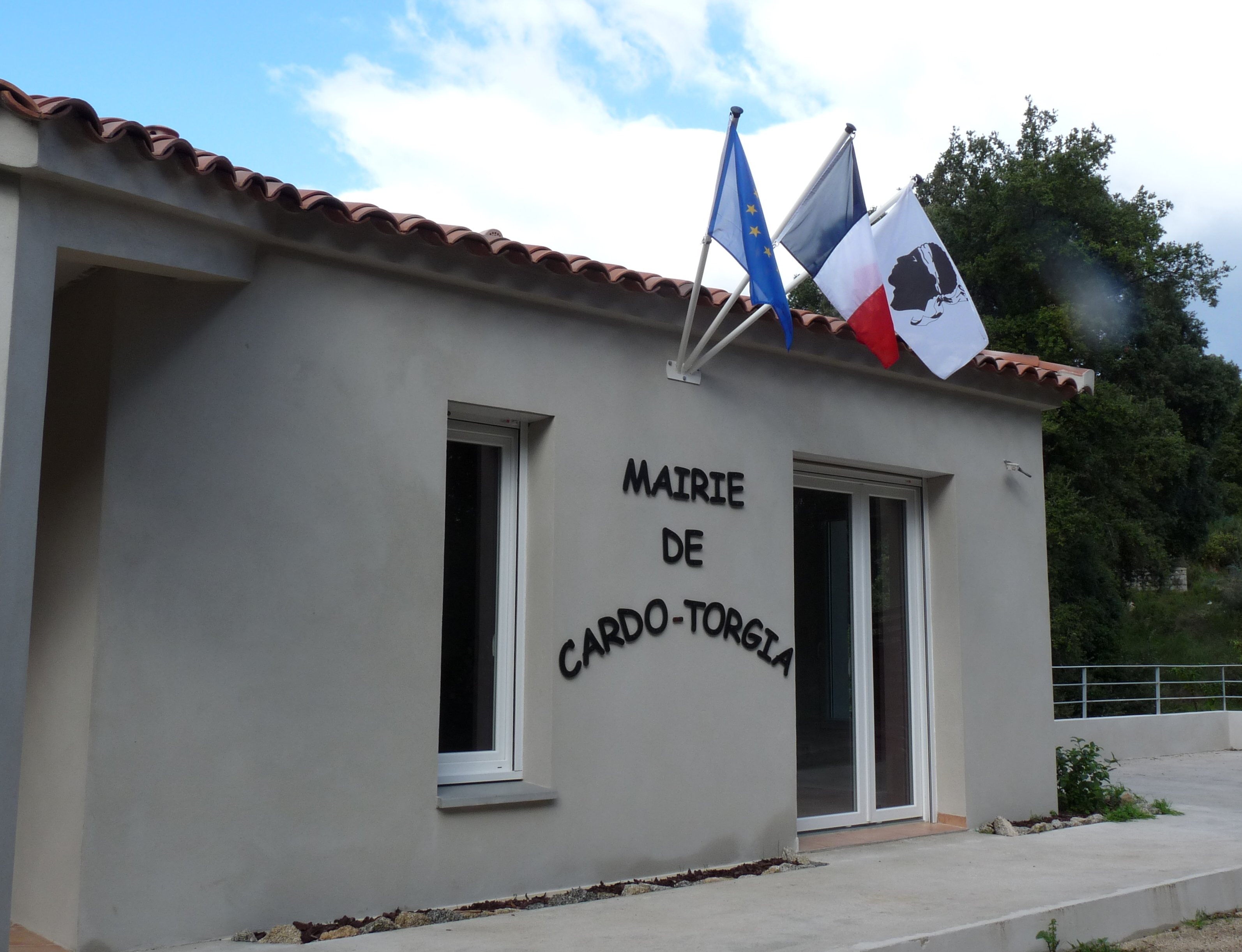 Mairie